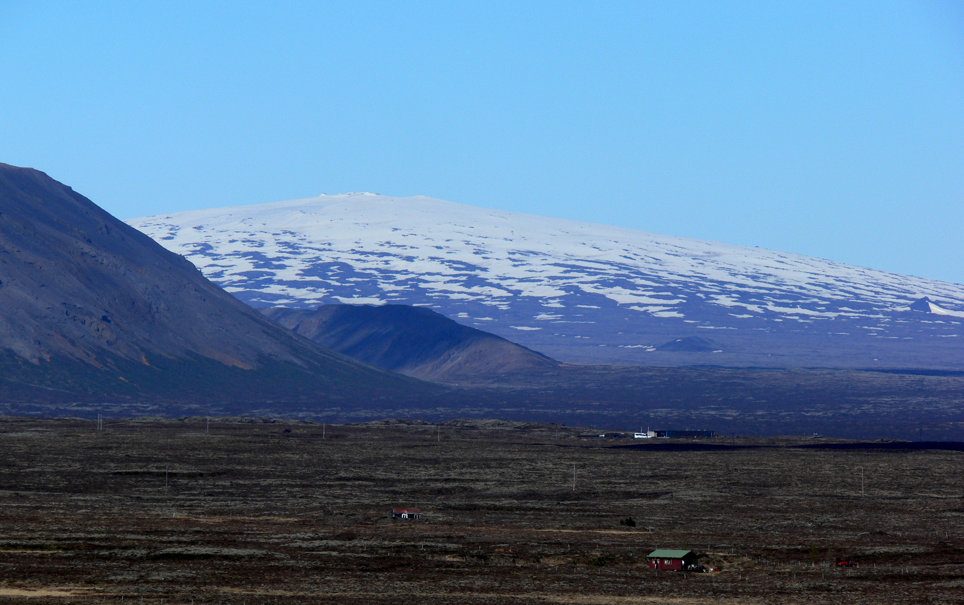 Blick auf Skjaldbreiður